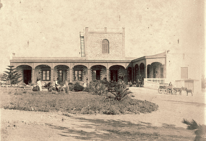 Casona Antigua en 1895